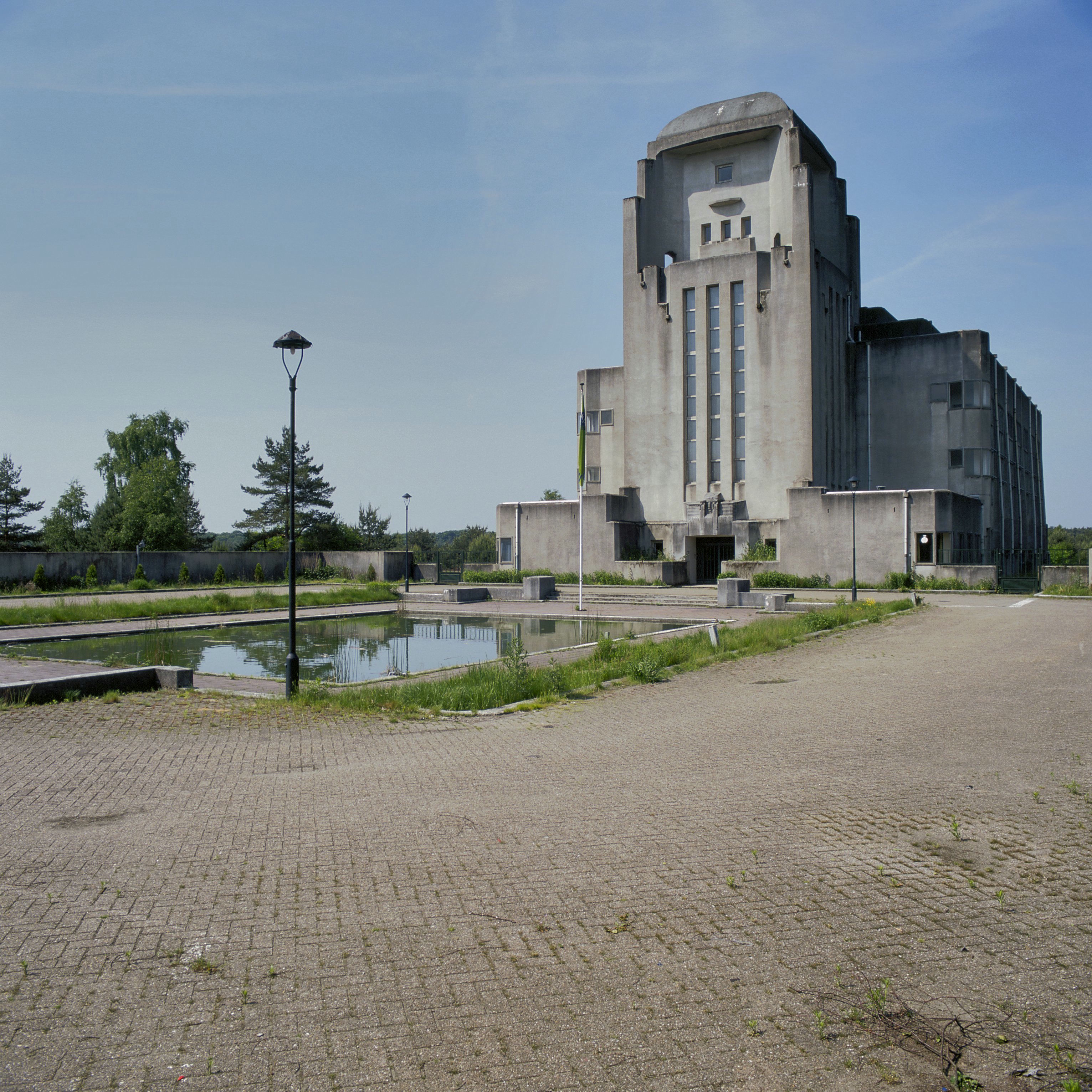 Radiozendstation: Overzicht van de voorzijde (opmerking: Gefotografeerd voor "ANWB Monumentenboek Nederland")